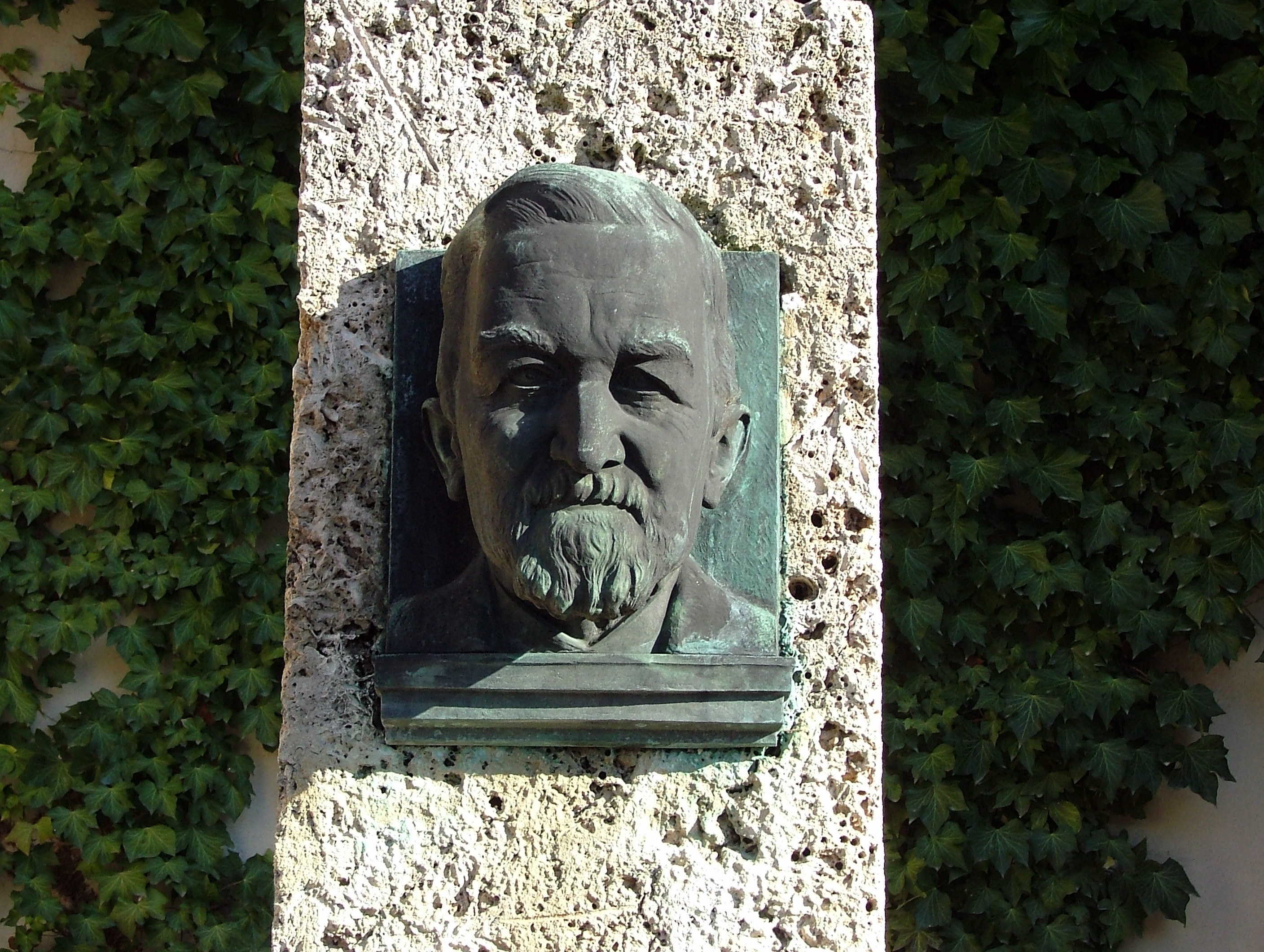 Ehrenbürger